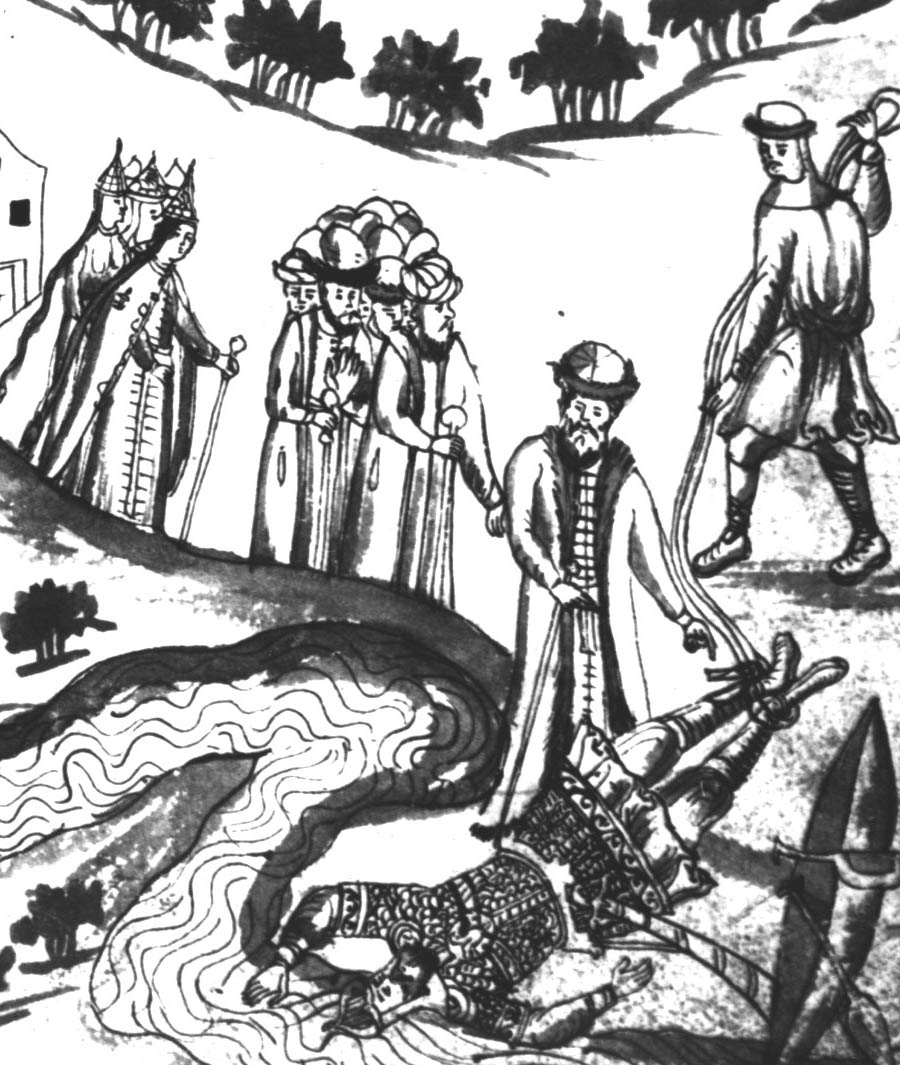 Татарин Якыш, Бегишев внук, вытаскивает из реки тело Ермака